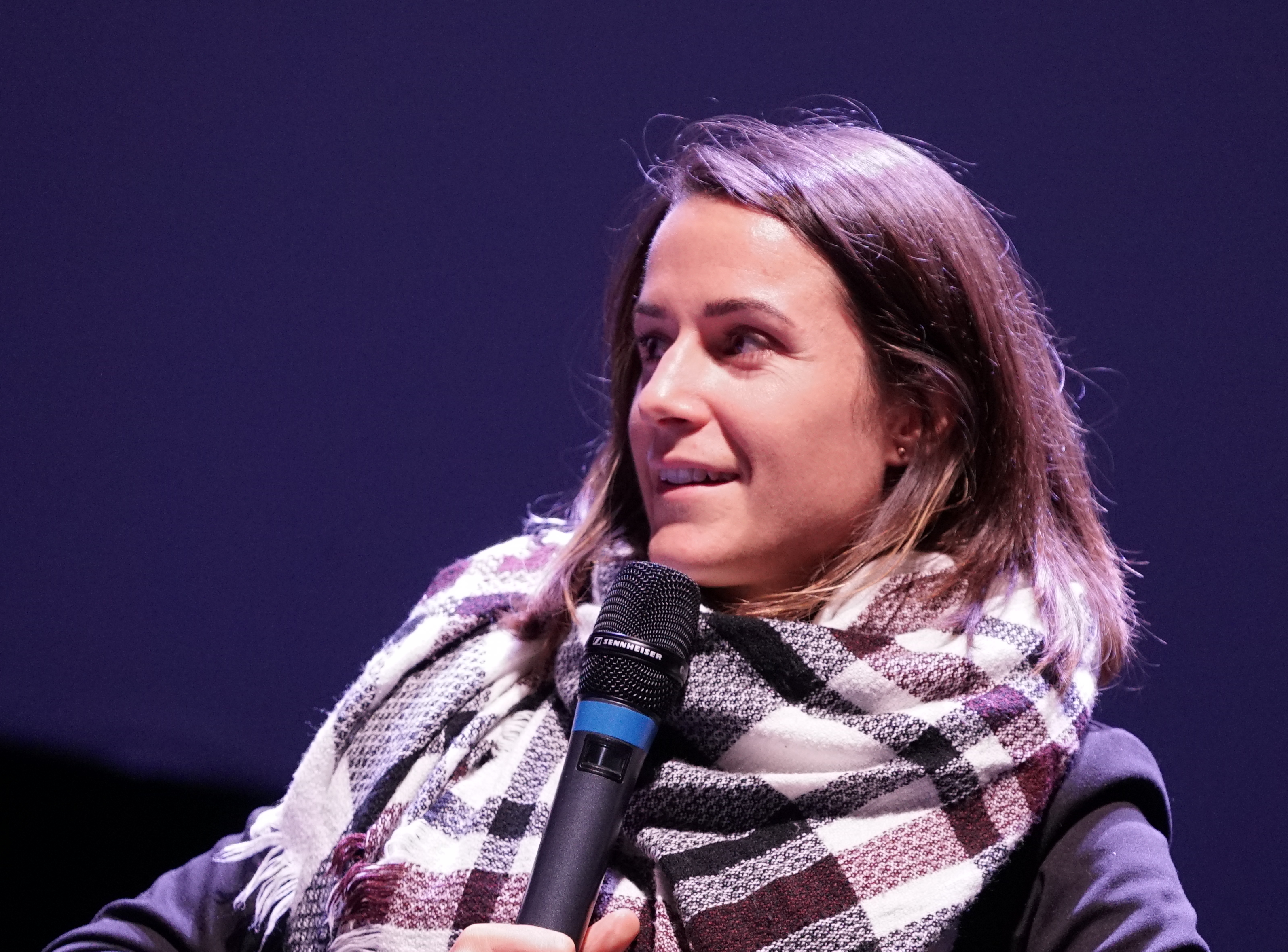 en conférence au Cellier pour M'Auteurs organisé par Nova Villa.